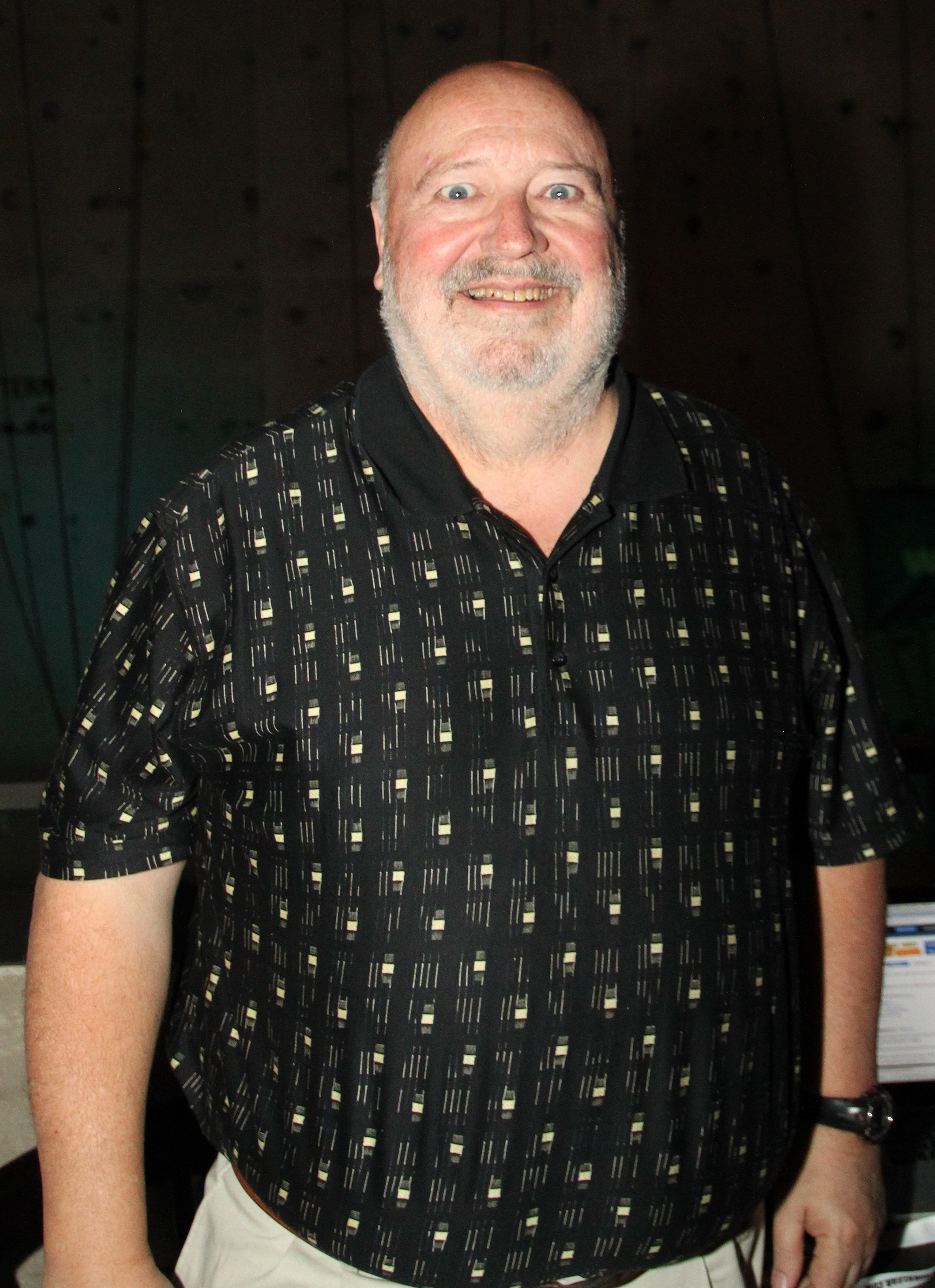 Al Lowe! 3/3